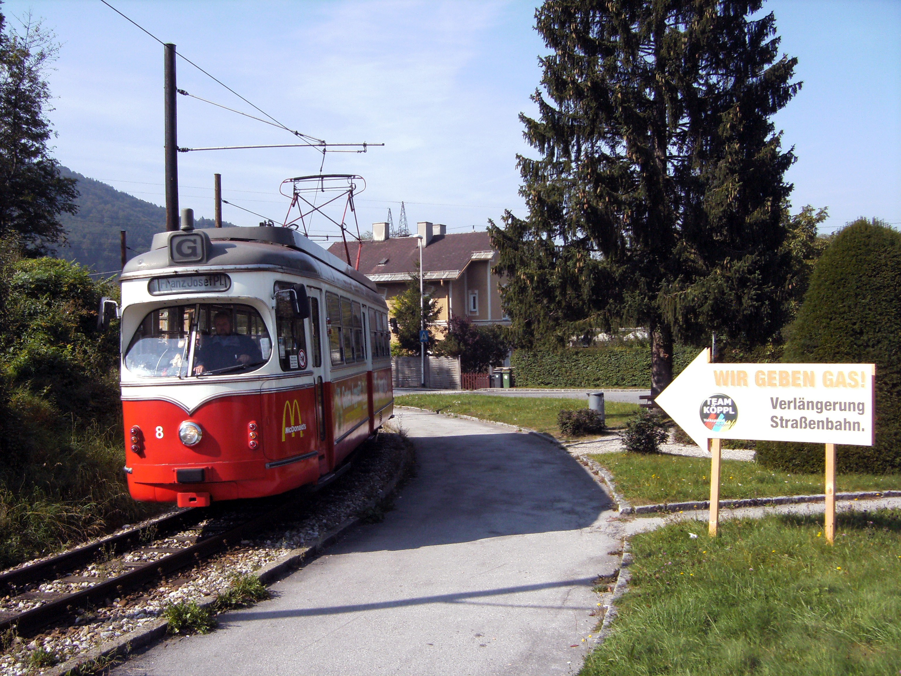 Ankündigung der Straßenbahnverlängerung (Pfeil) und GM 8 im "Grüner Wald-Bogen"